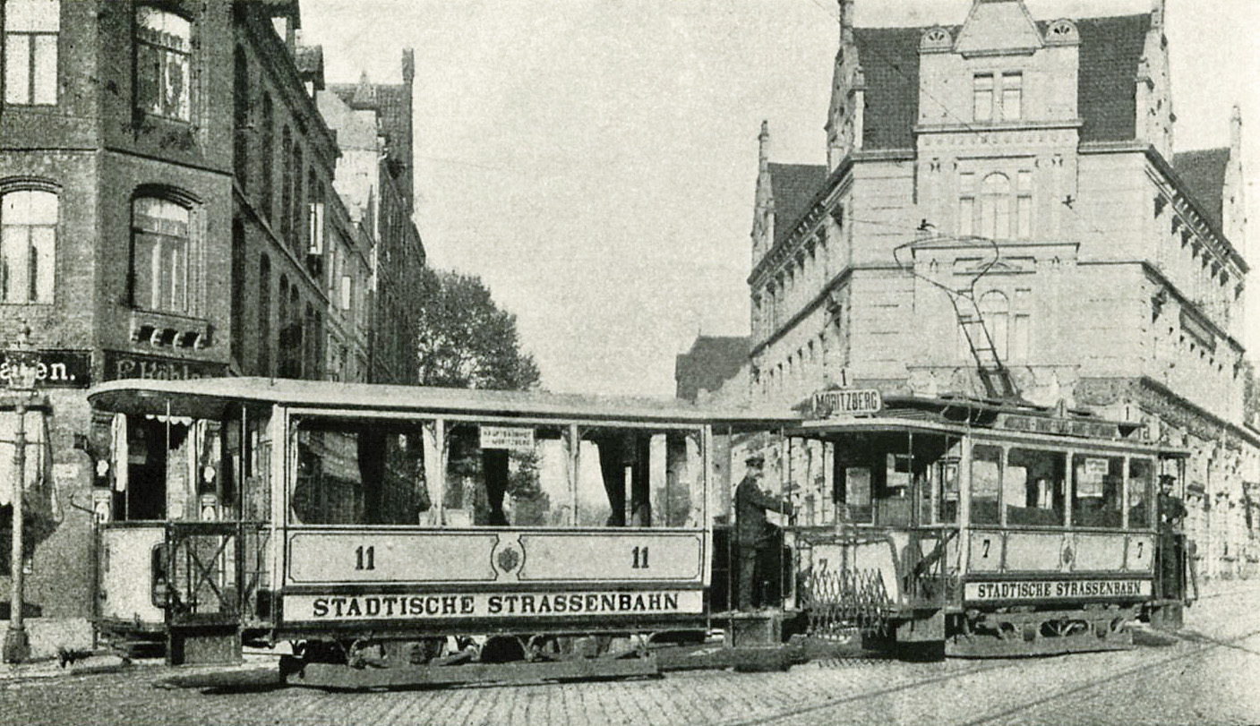 Elektrische Straßenbahn in Hildesheim; Triebwagen 7 mit Beiwagen 11.